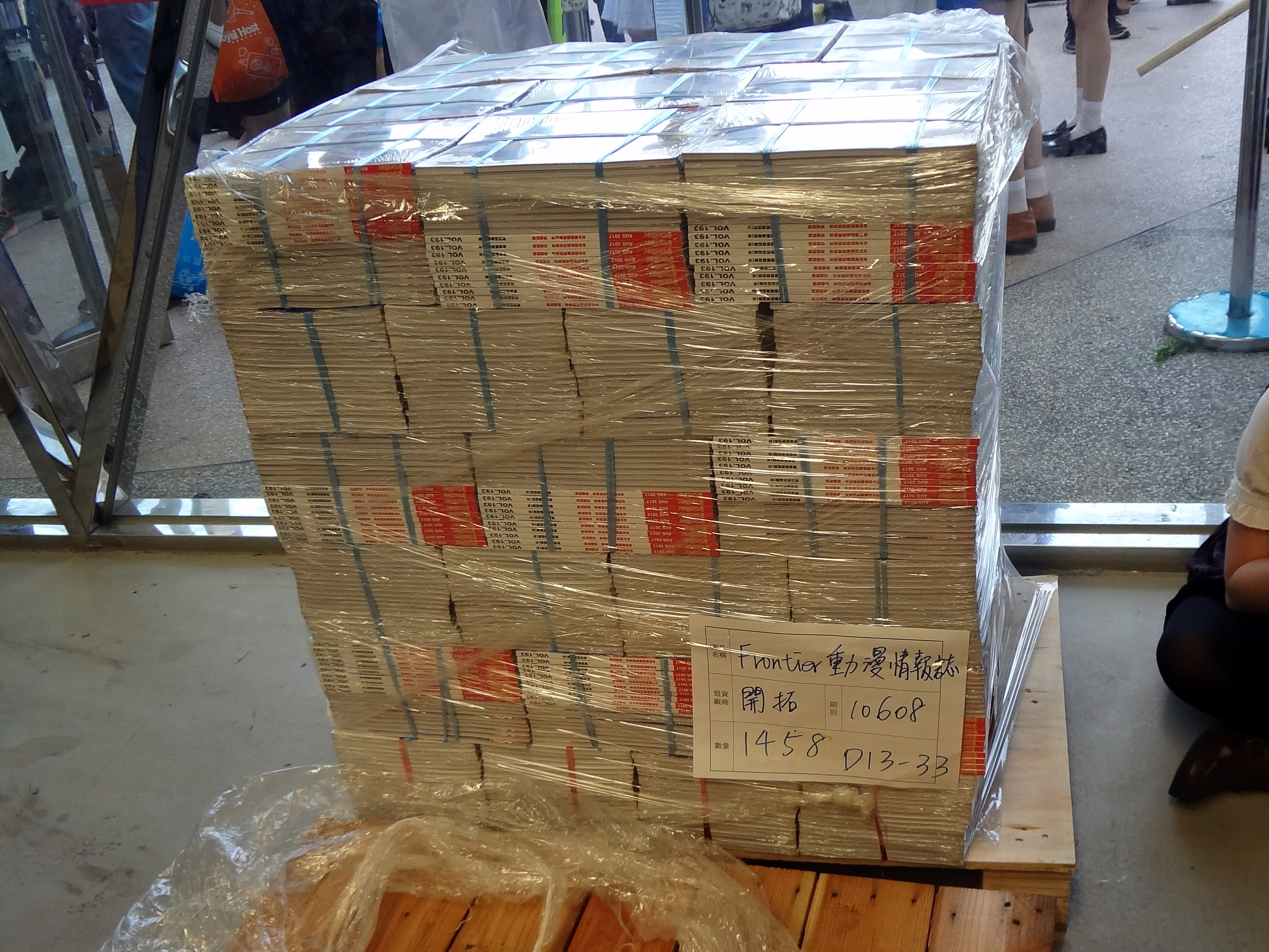 第28屆亞洲動漫創作展，木頭棧板上以透明塑膠膜包覆的《開拓動漫畫情報誌》第193期。